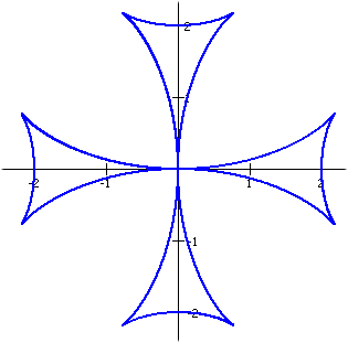 Doppia croce di malta. Curva matematica